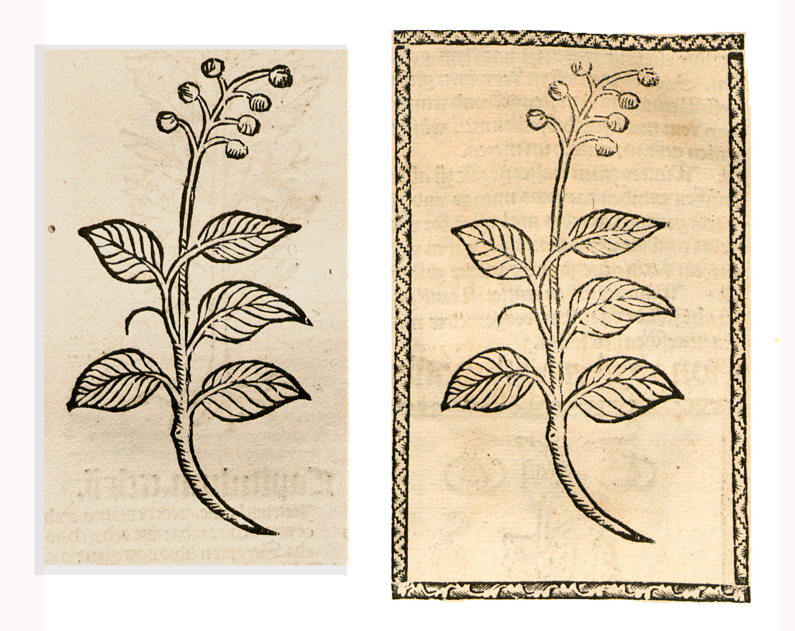 Abbildung von: Winter Grüen (Pyrolia rorundifolia)